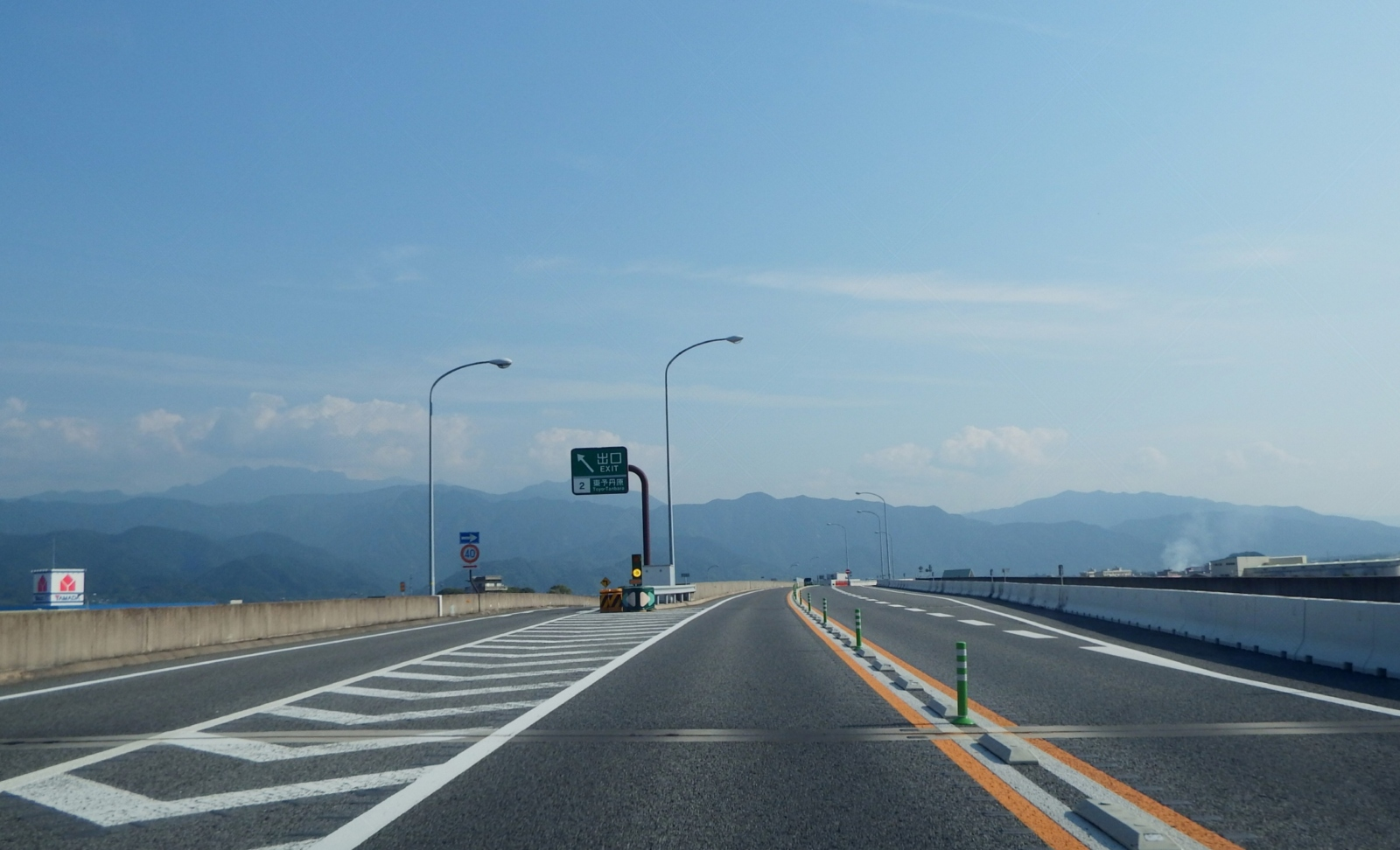 丹原インターチェンジ